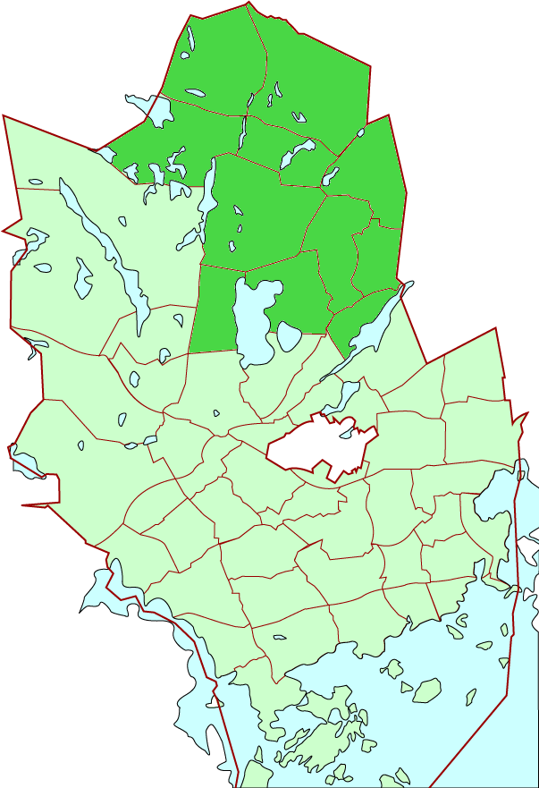 Pohjois-Espoo/Norra Esbo district in Espoo city, Finland